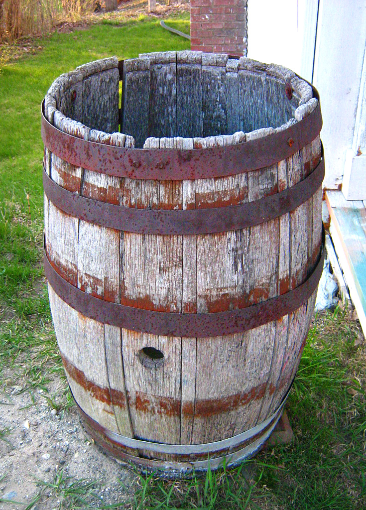 Vestige de l`usine Clarke